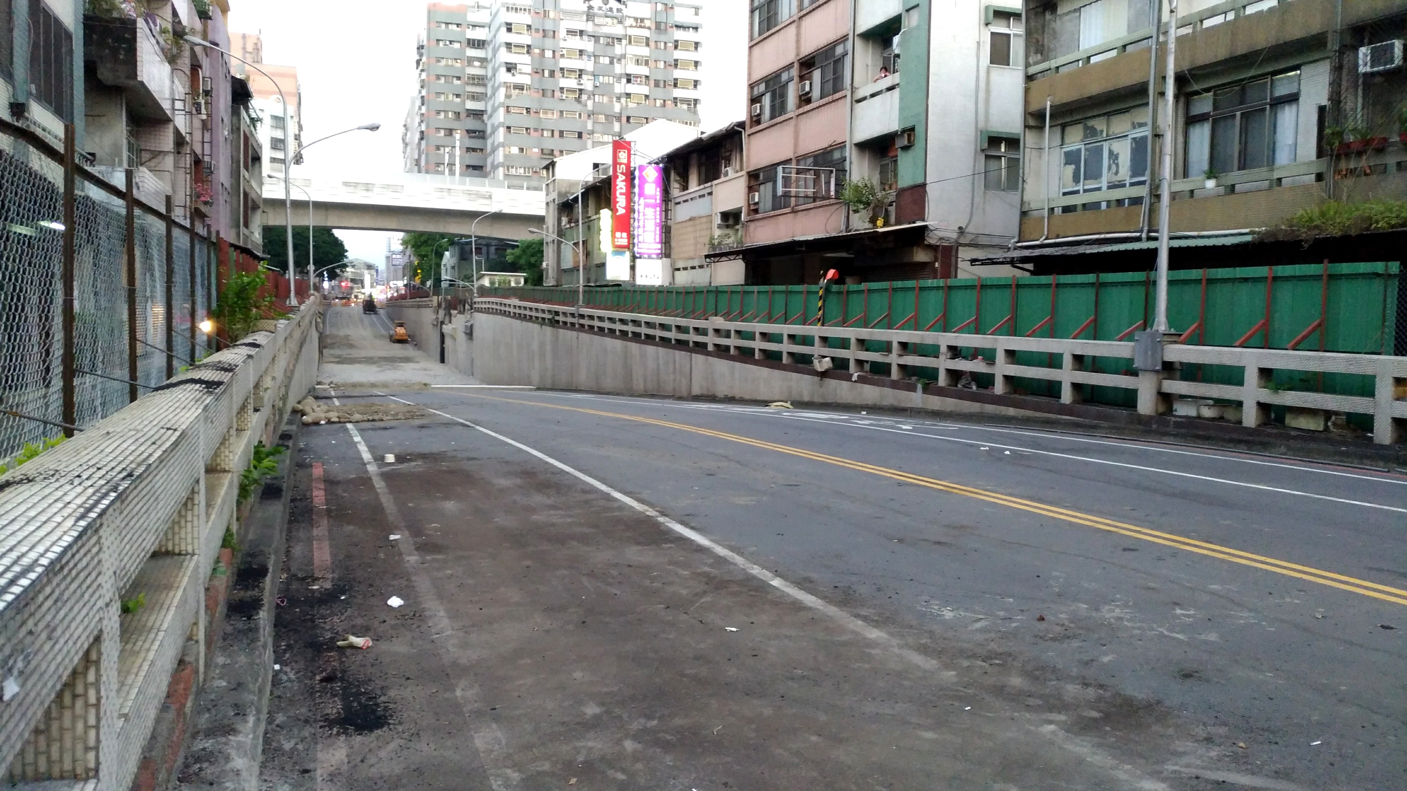 中文（台灣）: 東山路地下車道拆除工程